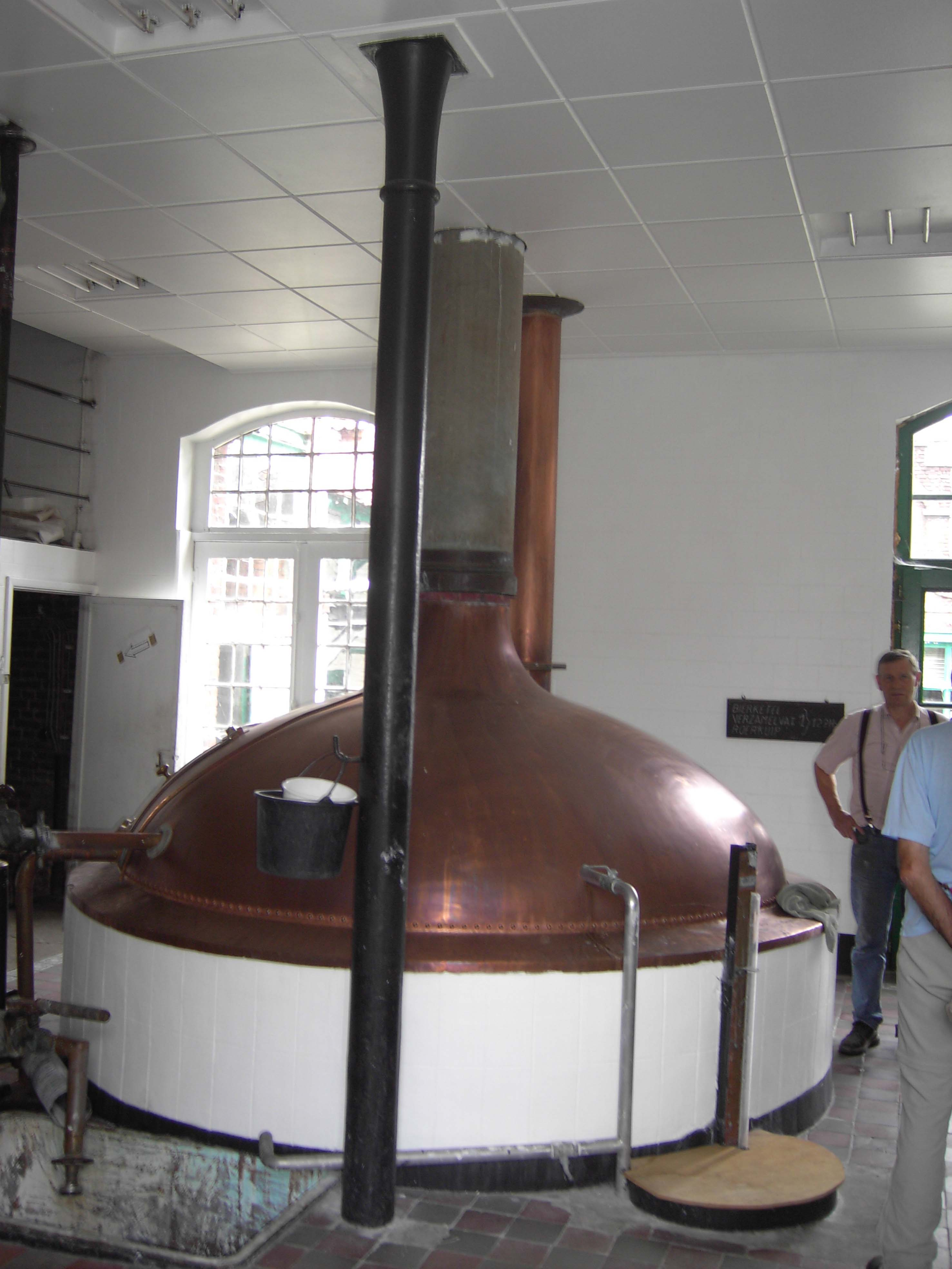 Brouwerij Vandenbossche - Sint-Lievens-Esse - Herzele - Oost-Vlaanderen - België